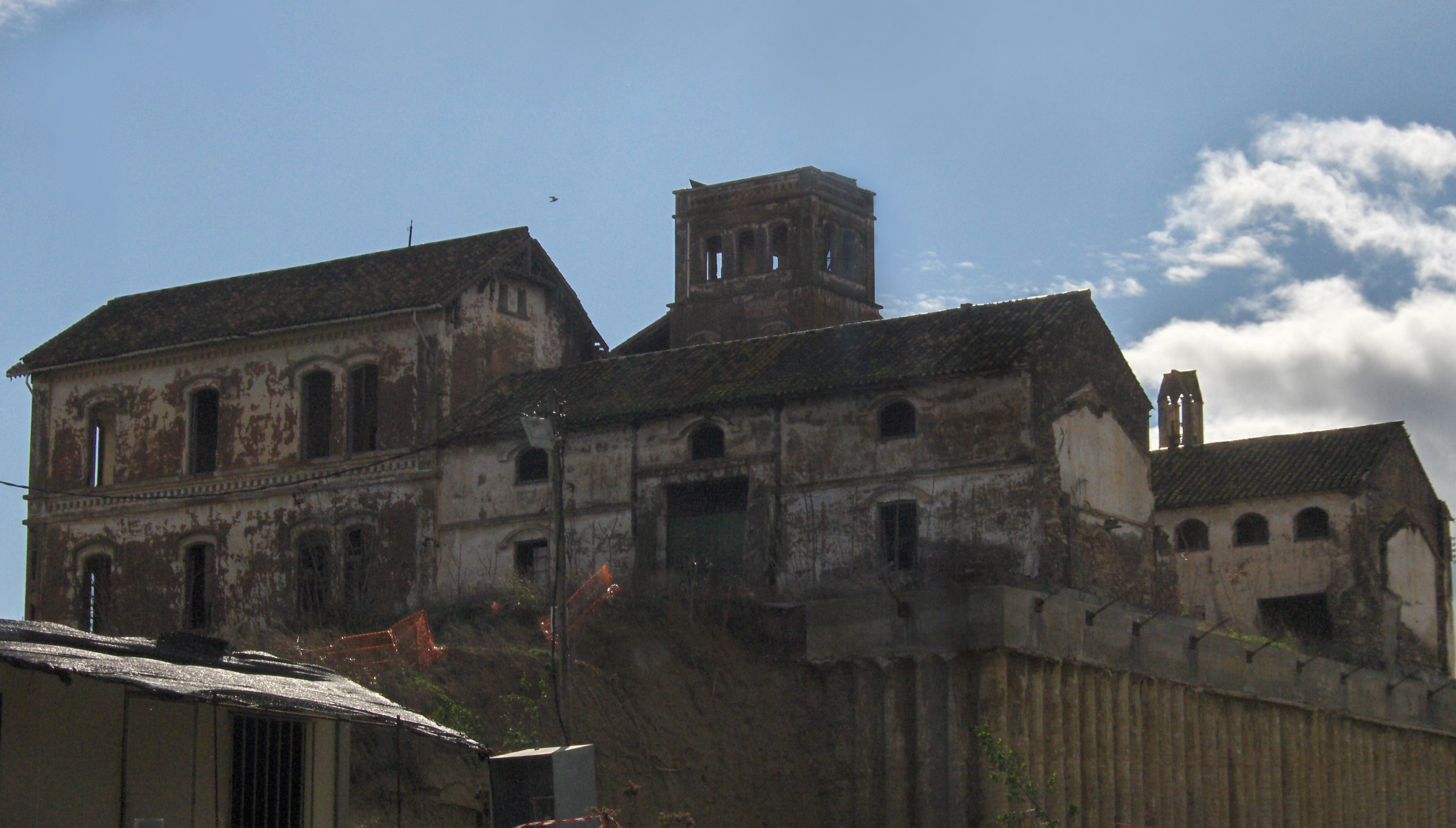 Cortijo Jurado, Málaga, ESpaña.